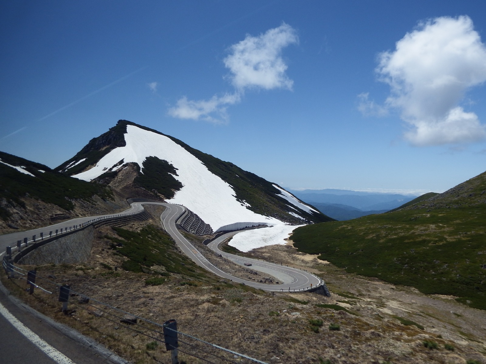 乗鞍スカイラインの猫岳付近